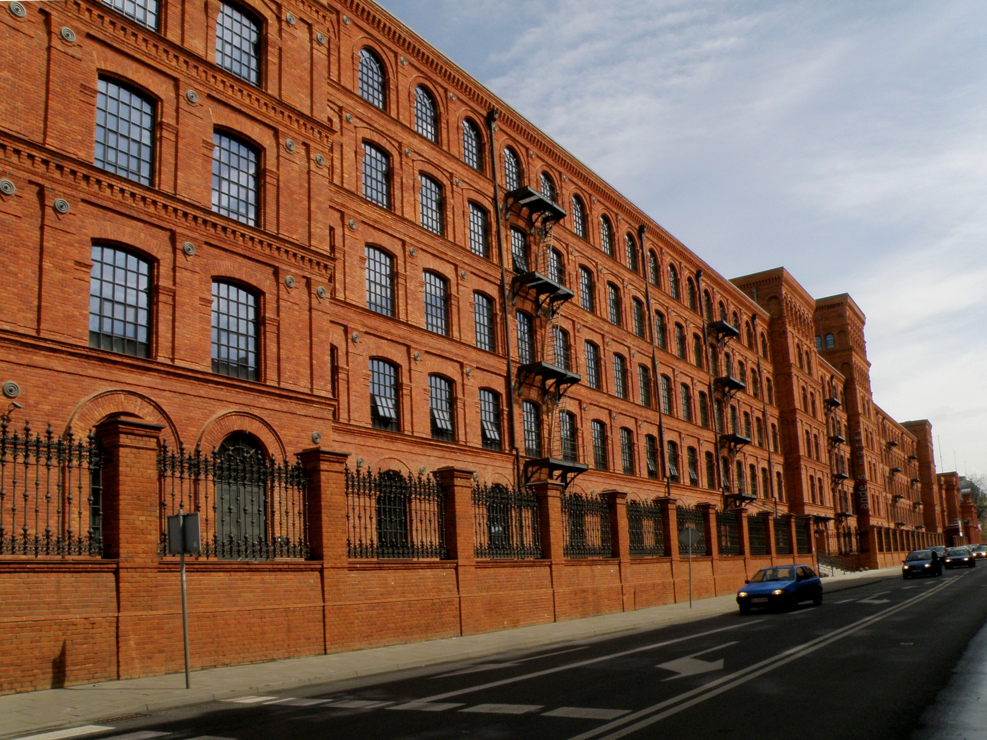 Część manufaktury w Łodzi, obecnie hotel.